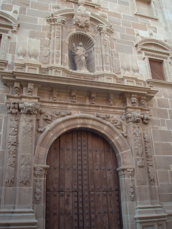 Portada de la Iglesia de las Dominicas de Tudela, en 2008